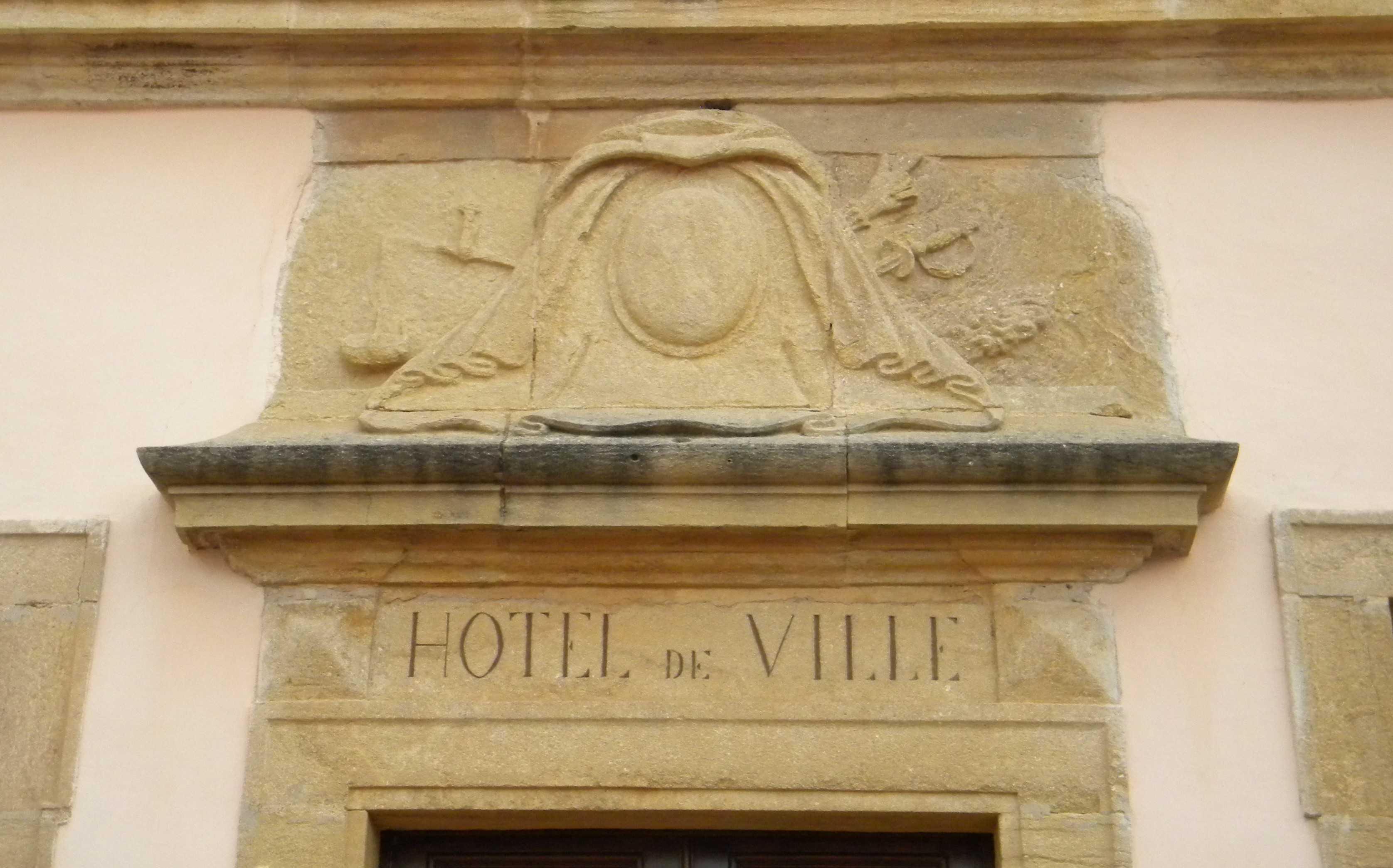 Porte d'entrée principale indiquant la double affectation du bâtiment Hôtel de Ville et auditoire de justice